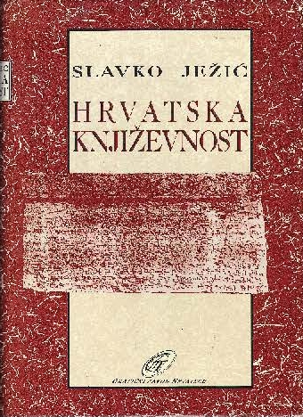 Ježić, Slavko, 1993., Hrvatska književnost. Od početka do danas 1100.-1941. (Drugo izdanje), Zagreb: Grafički zavod Hrvatske.